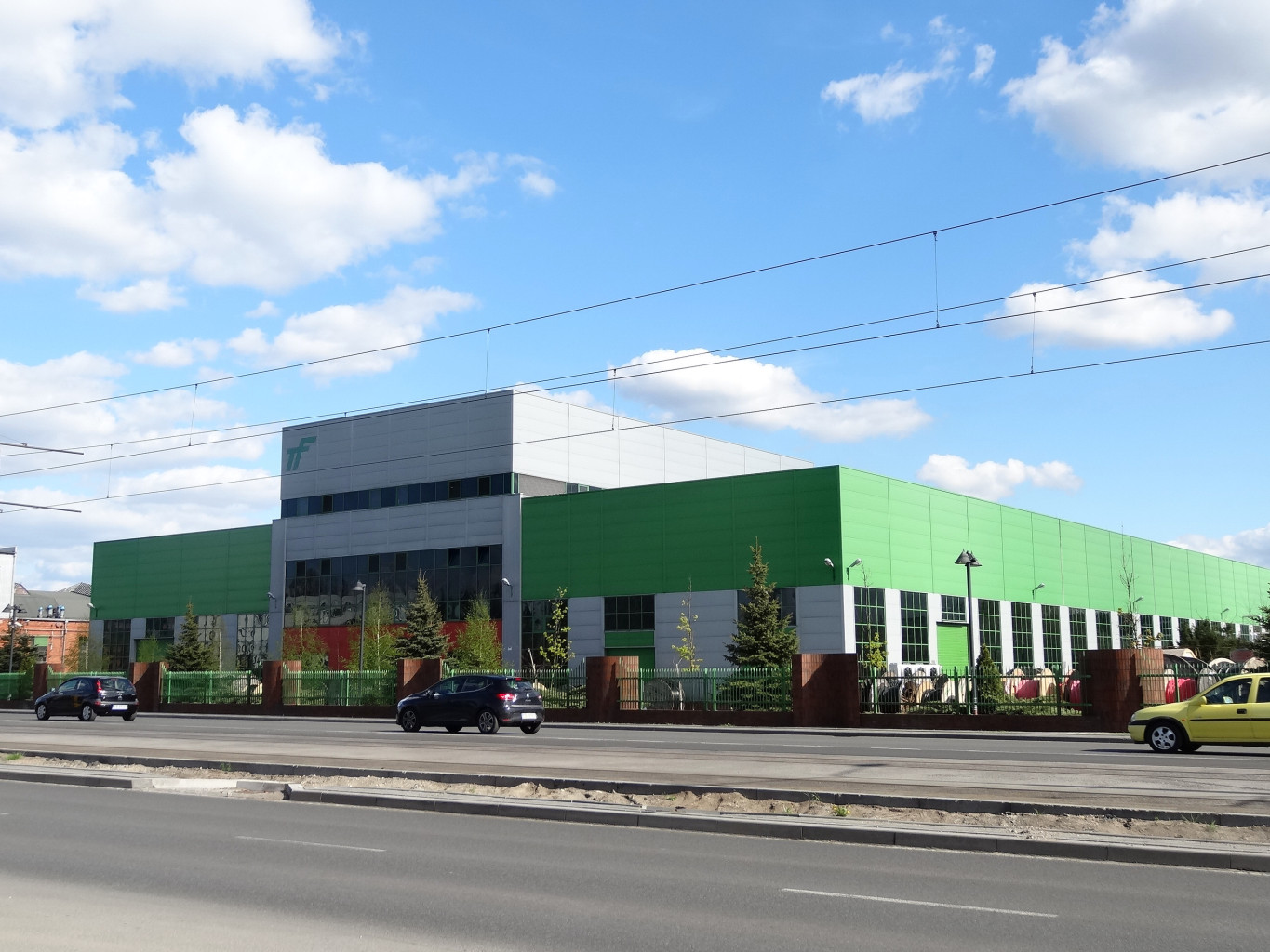 Zakład kabli wysokich napięć należący do Telefonika Kable w Bydgoszczy, ul. Fordońska